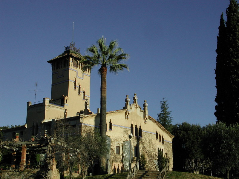 Can Xammar de Dalt - l'Ametlla del Vallès (Catalunya). s.XIV,rebuild 1908